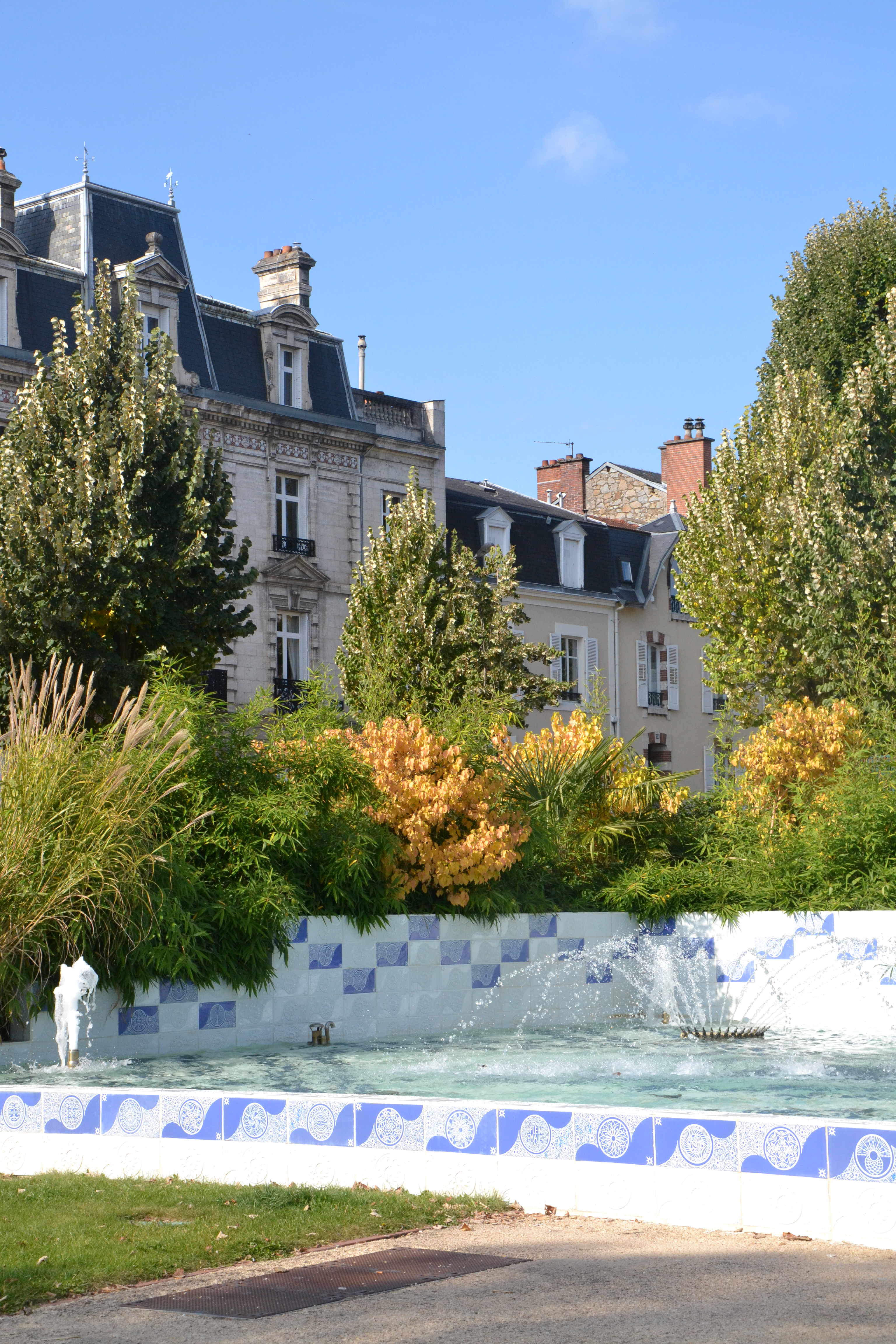 Fontaine du square des Émailleurs, Limoges (Haute-Vienne)